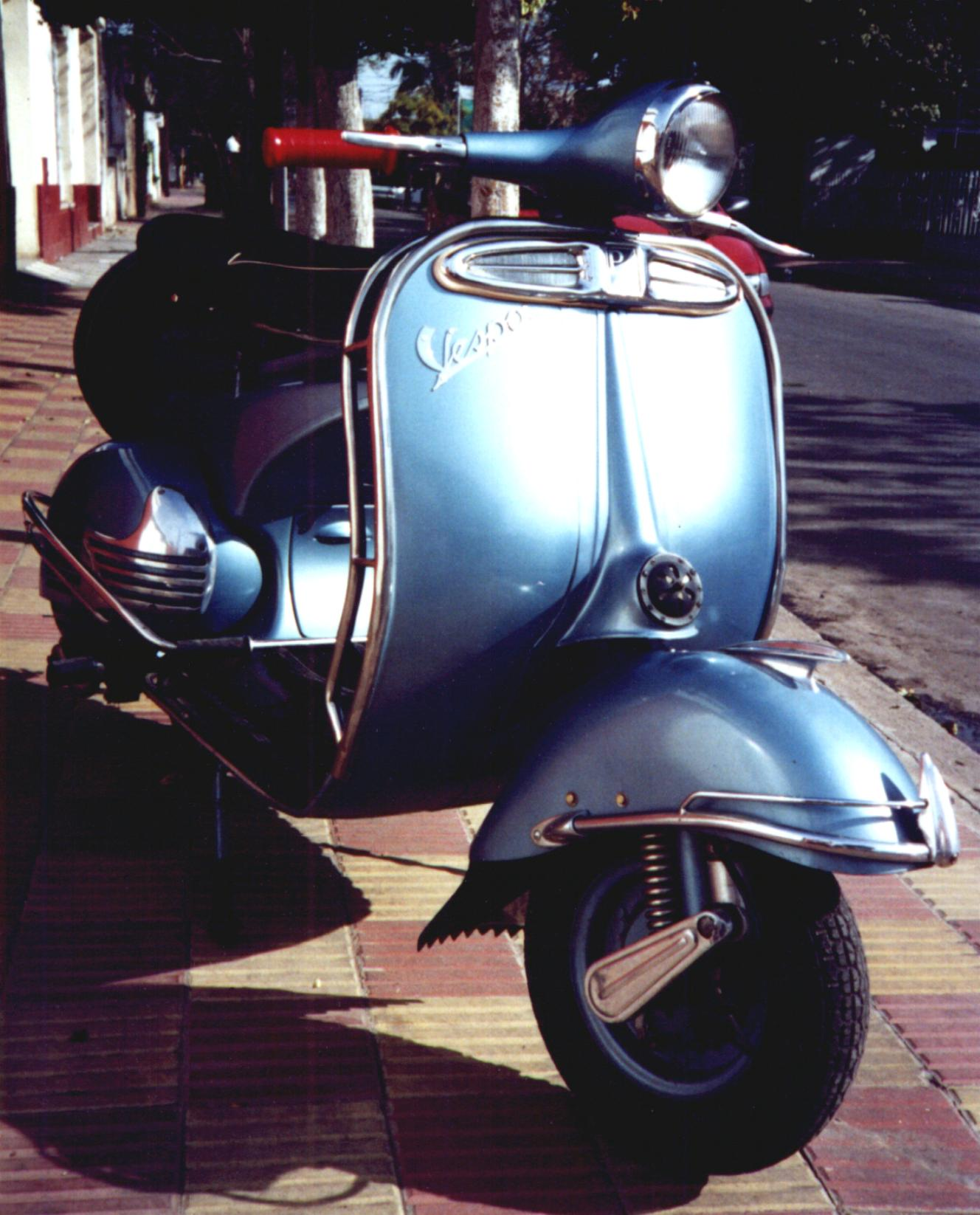 VESPA MOD 57.CÓRDOBA ARG.